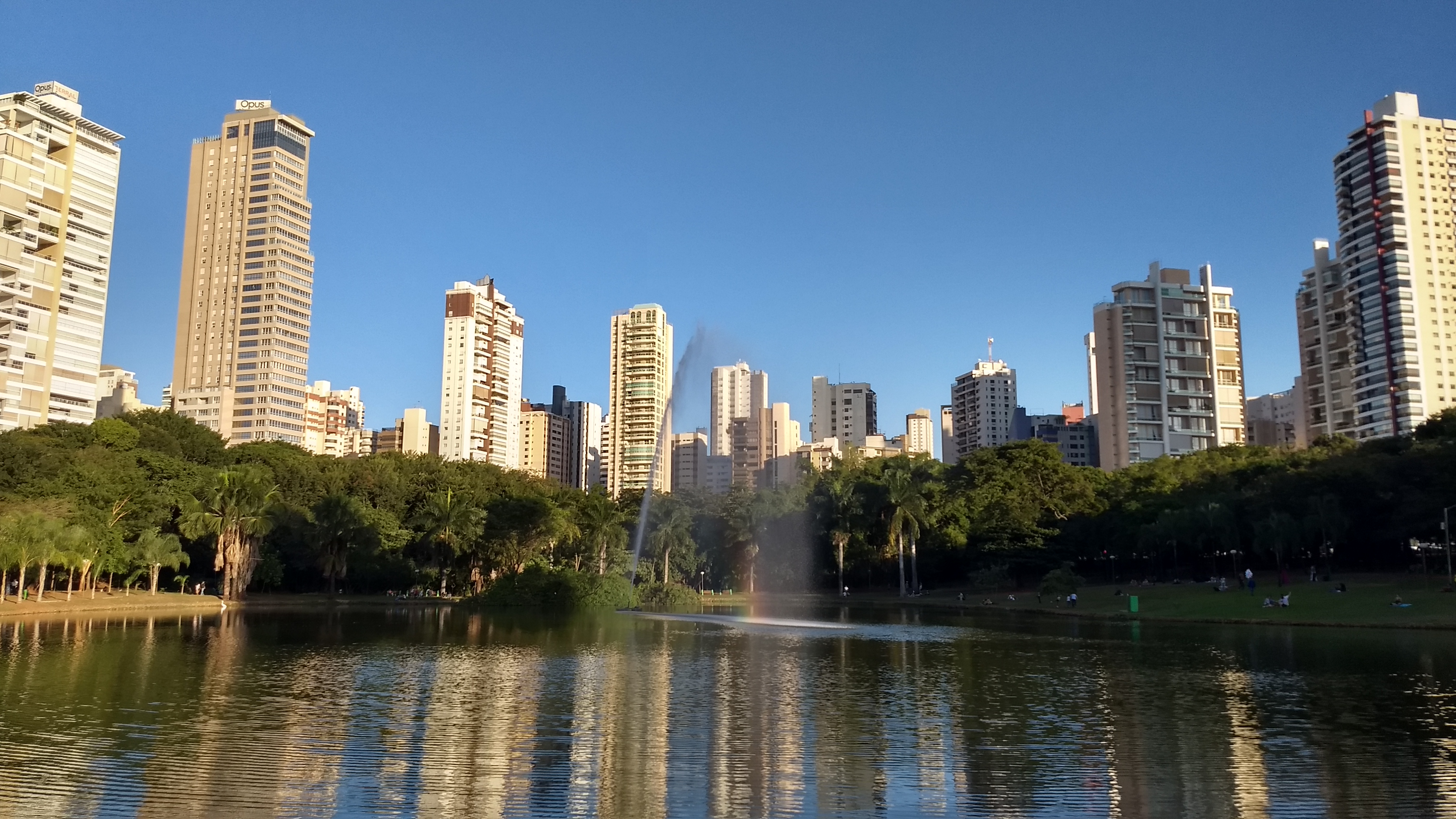 Vaca Brava Park in Goiânia , Goias Brazil 2019